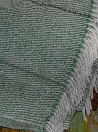 Plädens frans är drejad, dvs tvinnad. Se andra fransar på: Mönsterknuten frans med pärlknutar och Femflätad linfrans